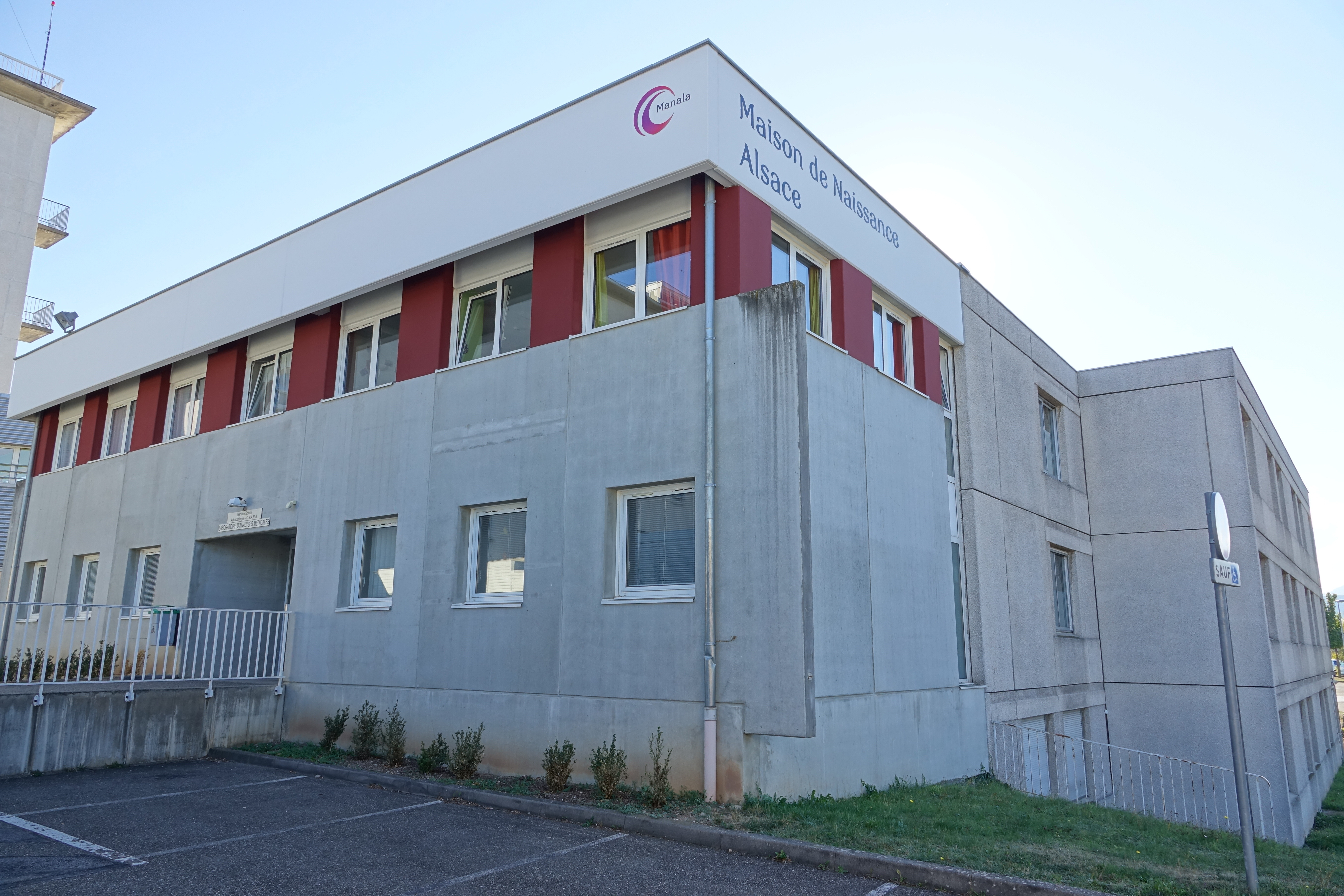 Manala au centre hospitalier de Sélestat (Bas-Rhin, France).